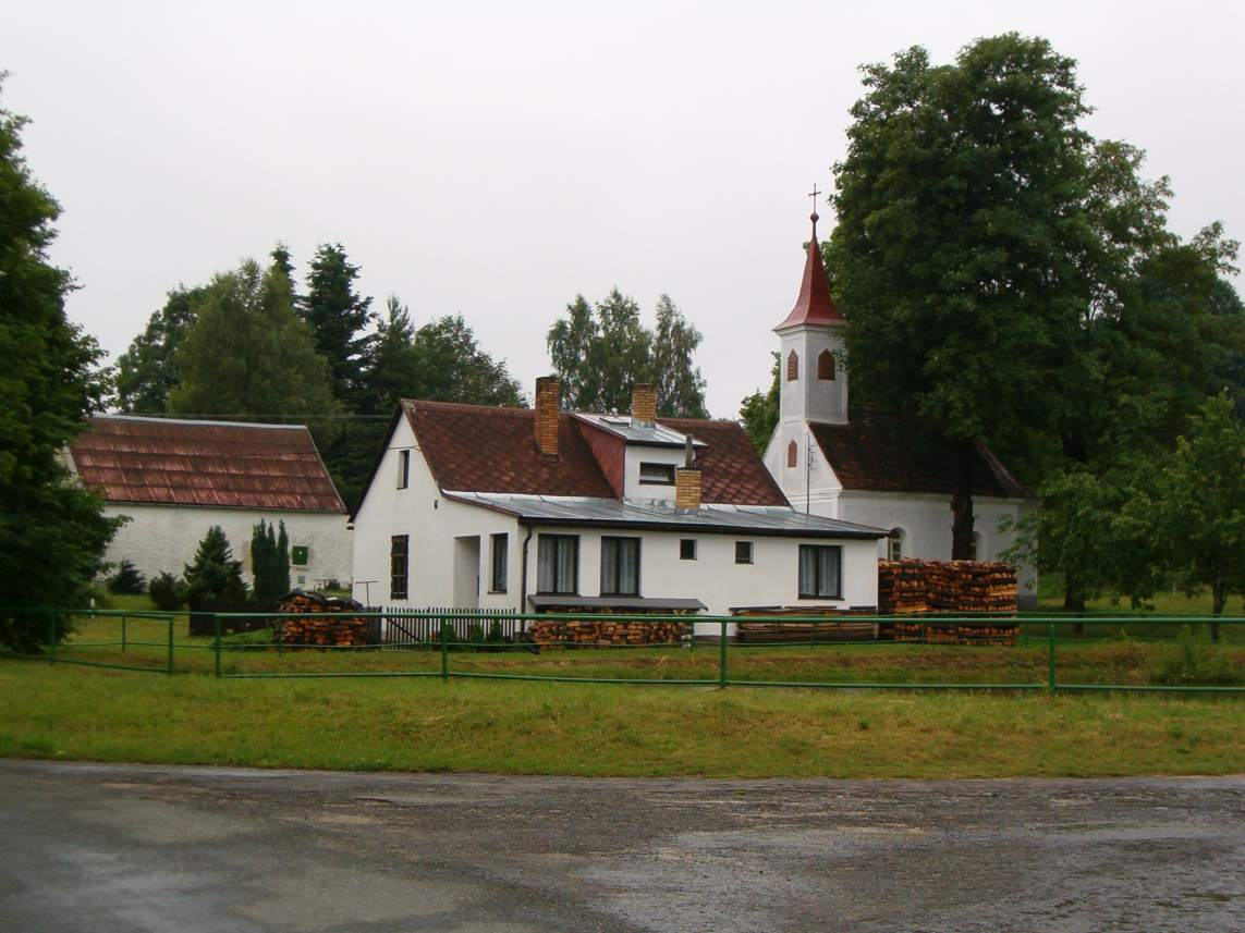 Náves s kapličkou ve Stálkově